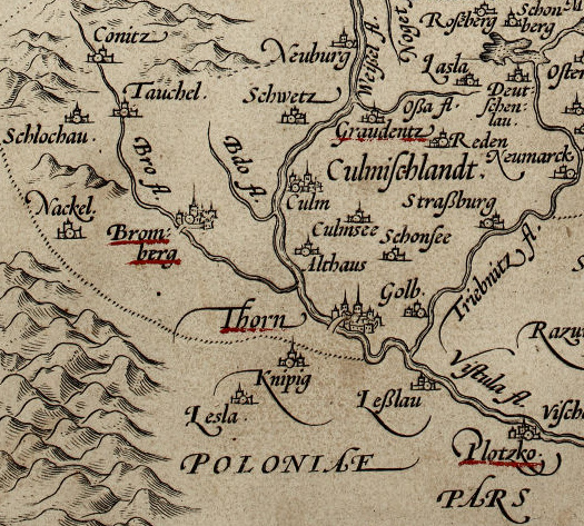 fragment mapy Prus, sporządzonej przez Henryka Zella (w 1542 r.?), zamieszczonej w atlasie Abrahama Orteliusa, wydanym w Antwerpii w 1573 r.